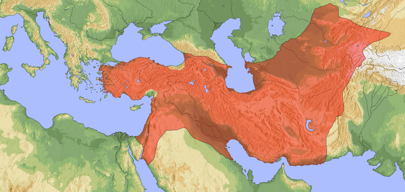 Selçuklu Haritası.